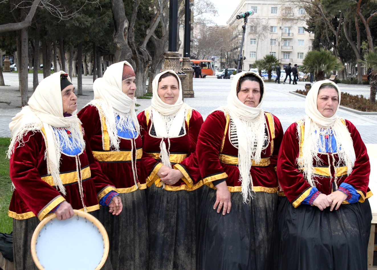 Фольклорный ансамбль на празднике Новруз